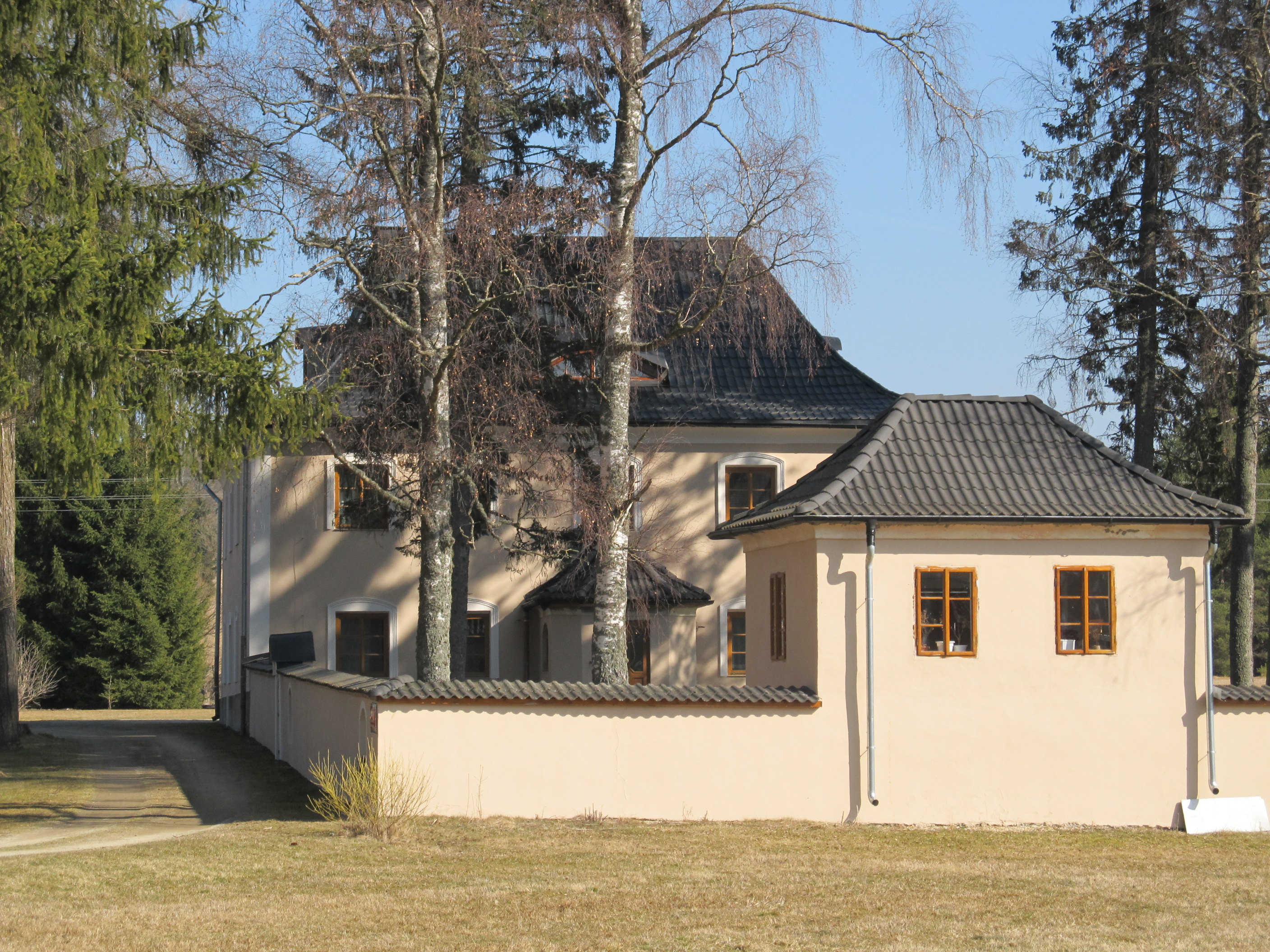 Arnoštov - penzion Zámeček